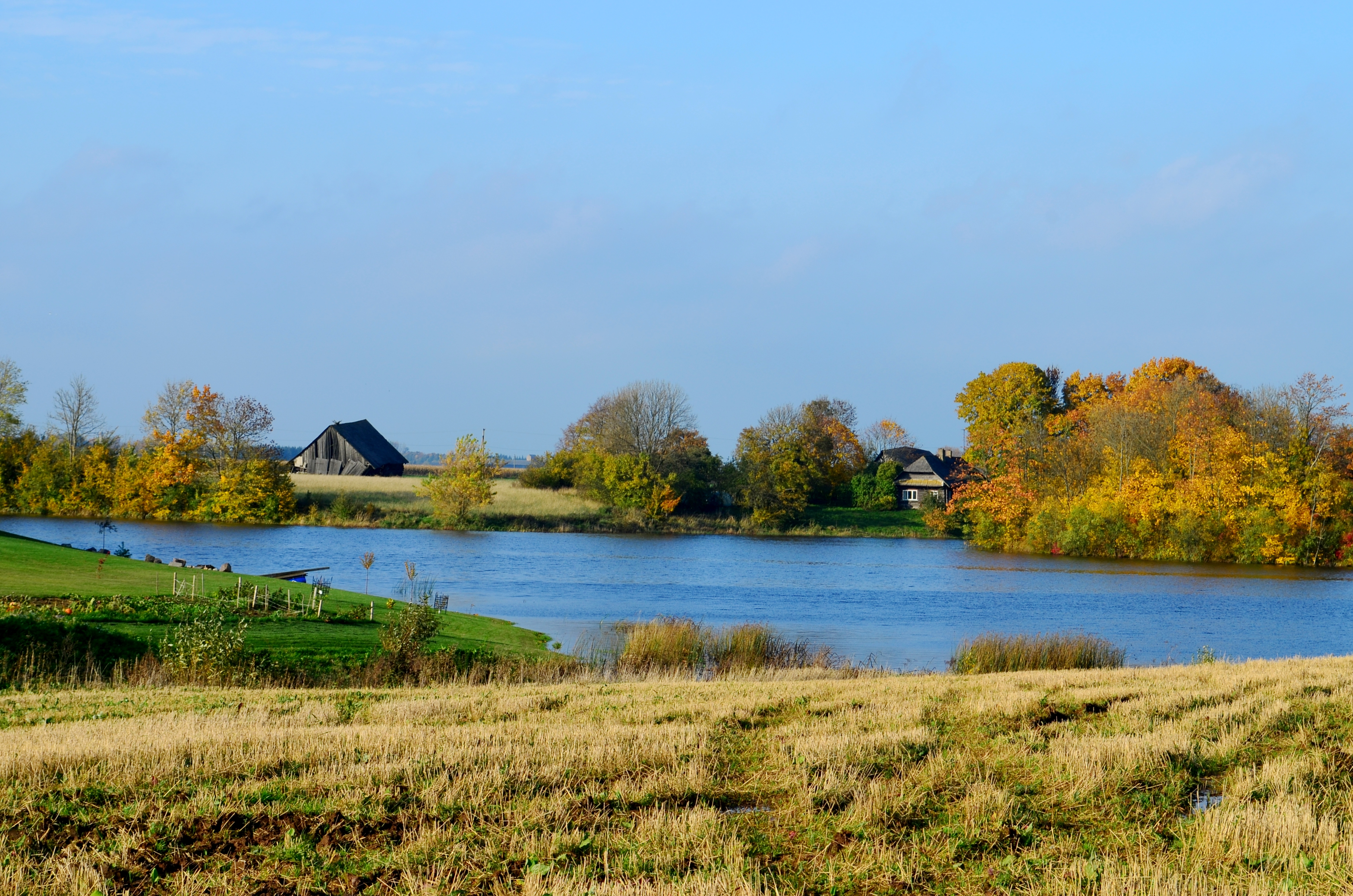 Daukainių sodyba prie Bublių tvenkinio, Kėdainių raj.